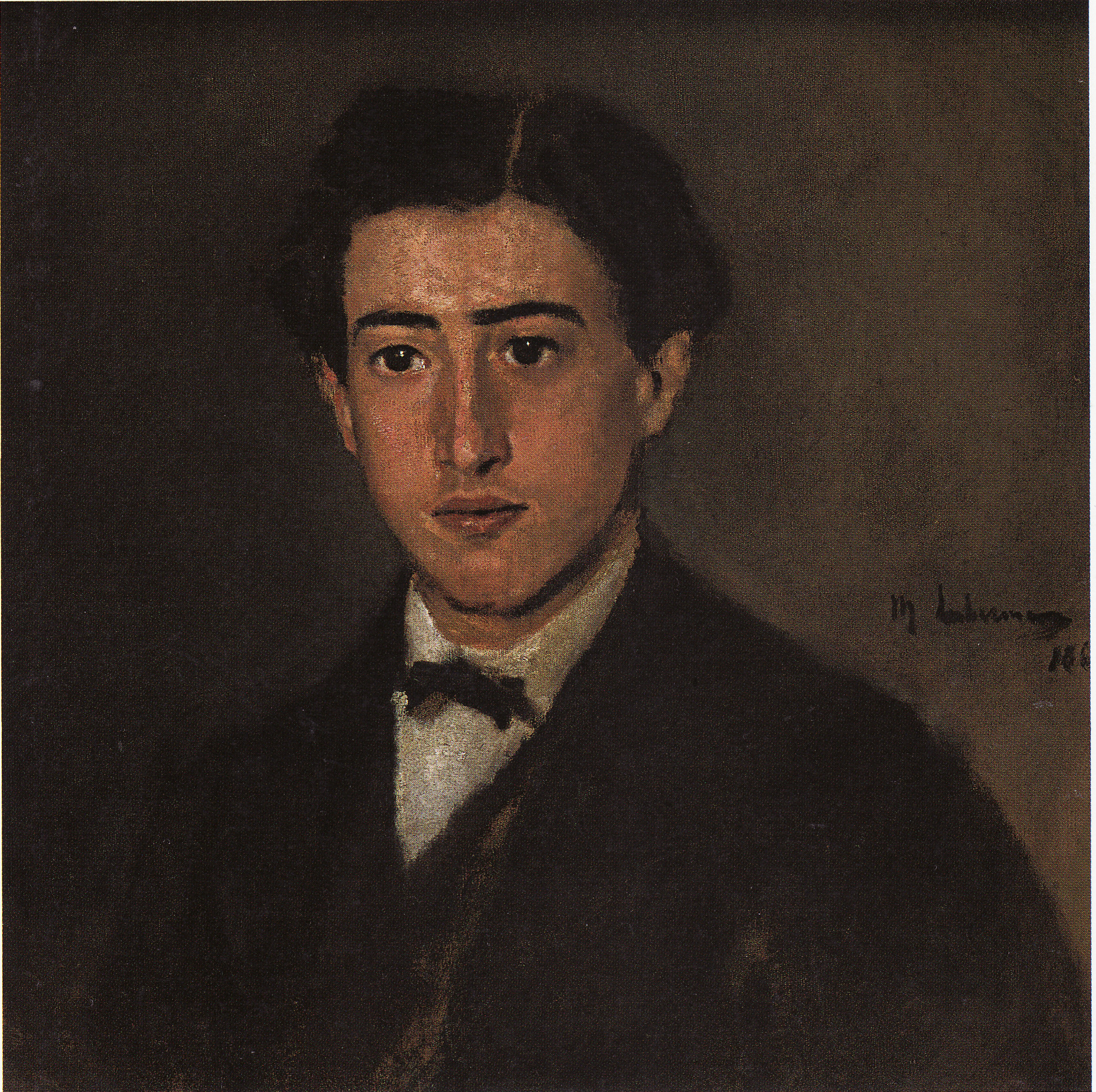 Felix Liebermann im Alter von 14 Jahren, Öl auf Leinwand, Verbleib unbekannt.